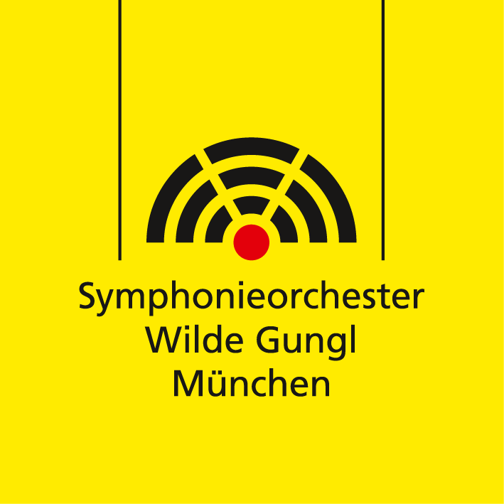 Bildmarke mit der Registernummer 30 2012 026 020 Vor Weiterverwendung Bitte um Anfrage an Logo, Redesign seit 2011